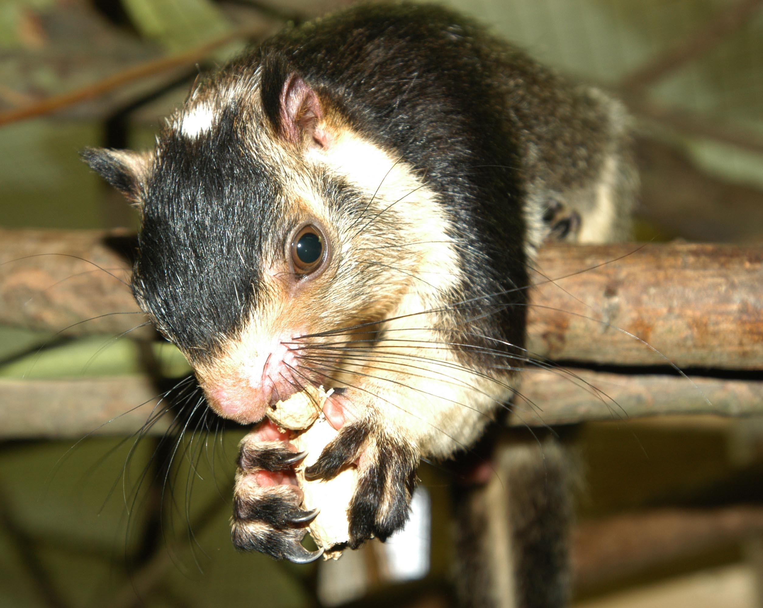 Ratufa černoprstá